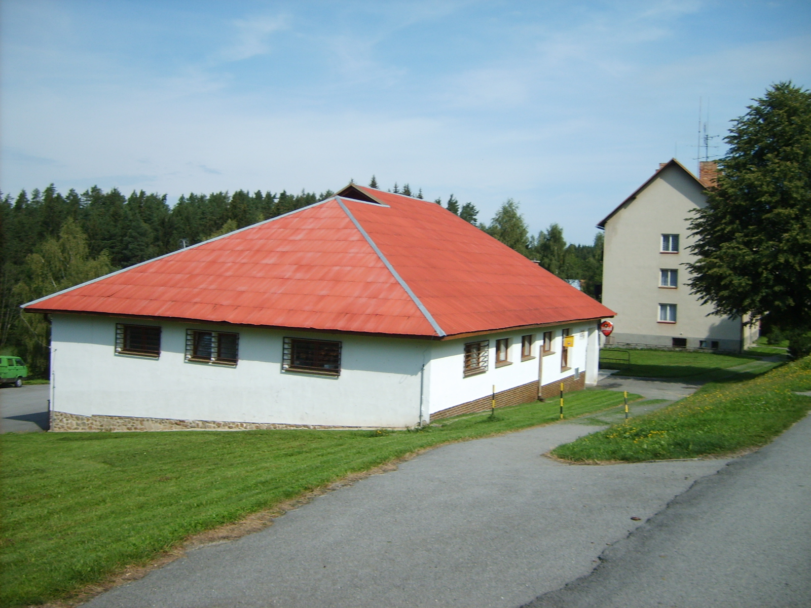 Shop in Pohorská Ves